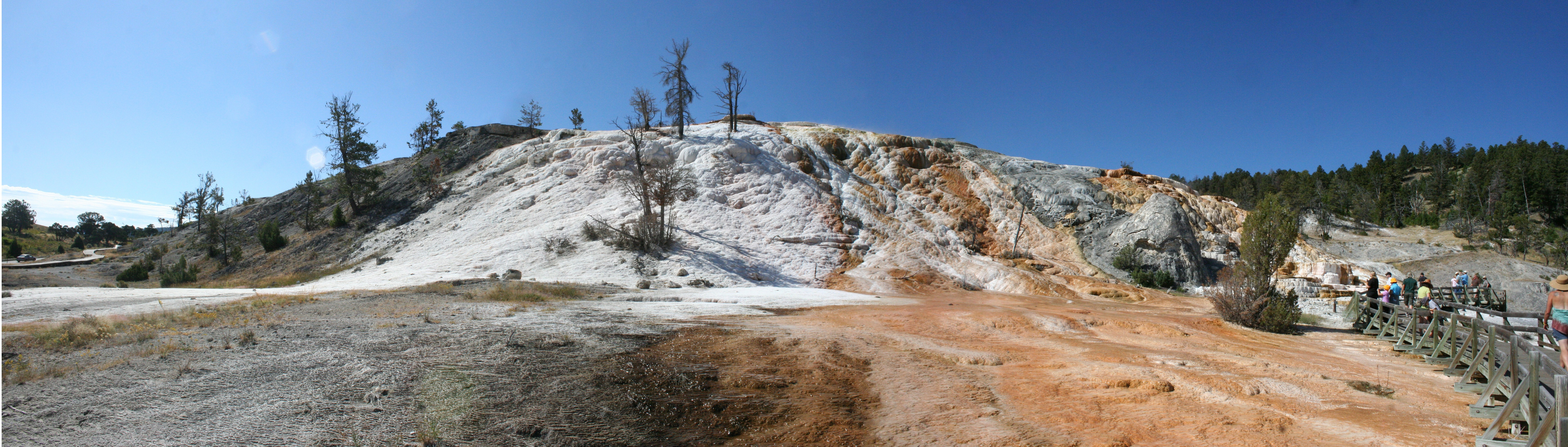 Mammoth Hot Springs2